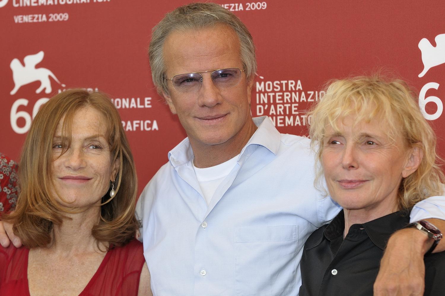 66ème Festival du Cinéma de Venise (Mostra), 5ème jour (06/09/2009) Photocall avec Christophe Lambert, Isabelle Huppert et Claire Denis pour le film en compétition : White Material